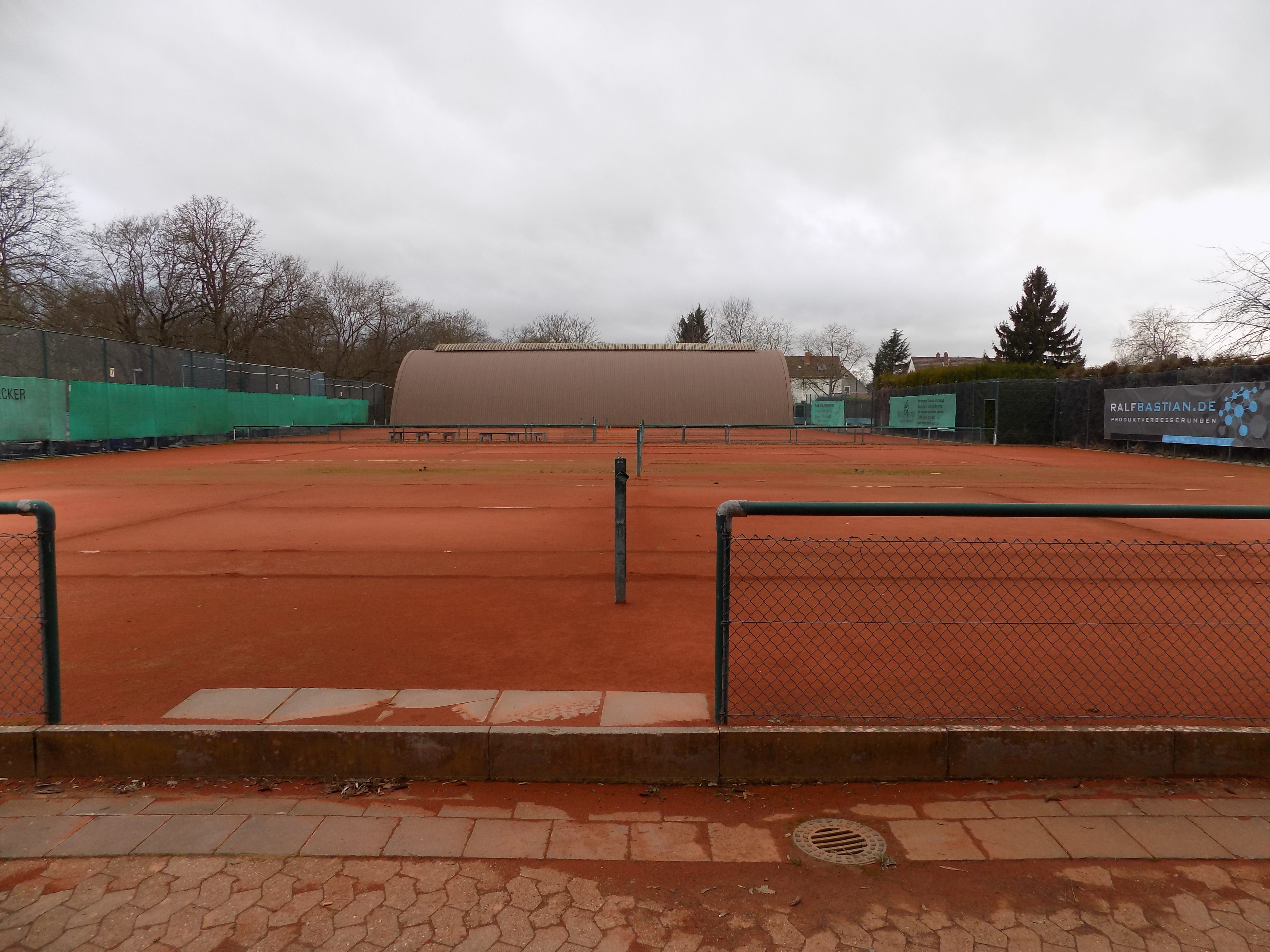 Platzanlage 2